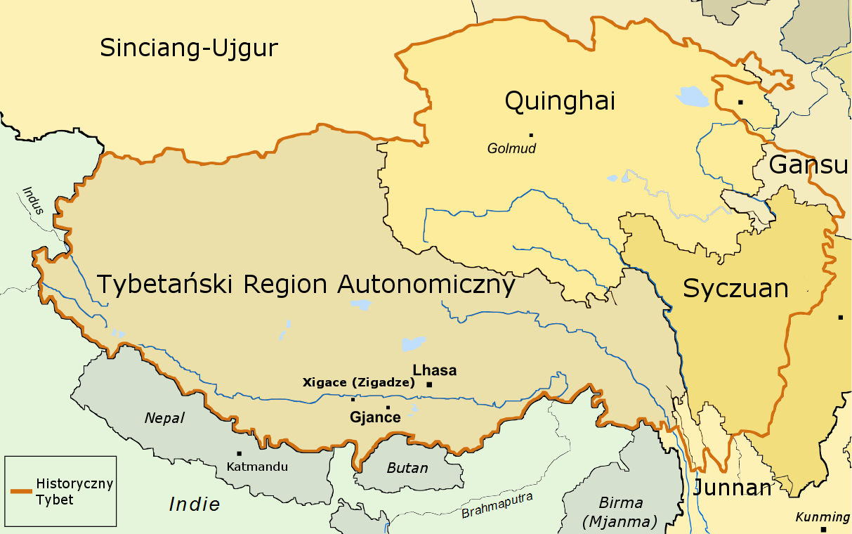 Terytorium historycznego Tybetu, zaznaczone linią w kolorze ciemnopomarańczowym na tle współczesnych granic administracyjnych.